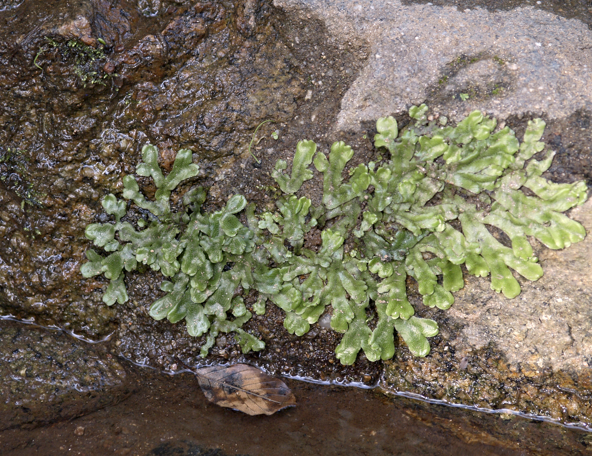 Hepática (O. Marchantiales). Probablemente Conocephalum sp. Losar de la Vera (Cáceres, España). 11-noviembre-2007.